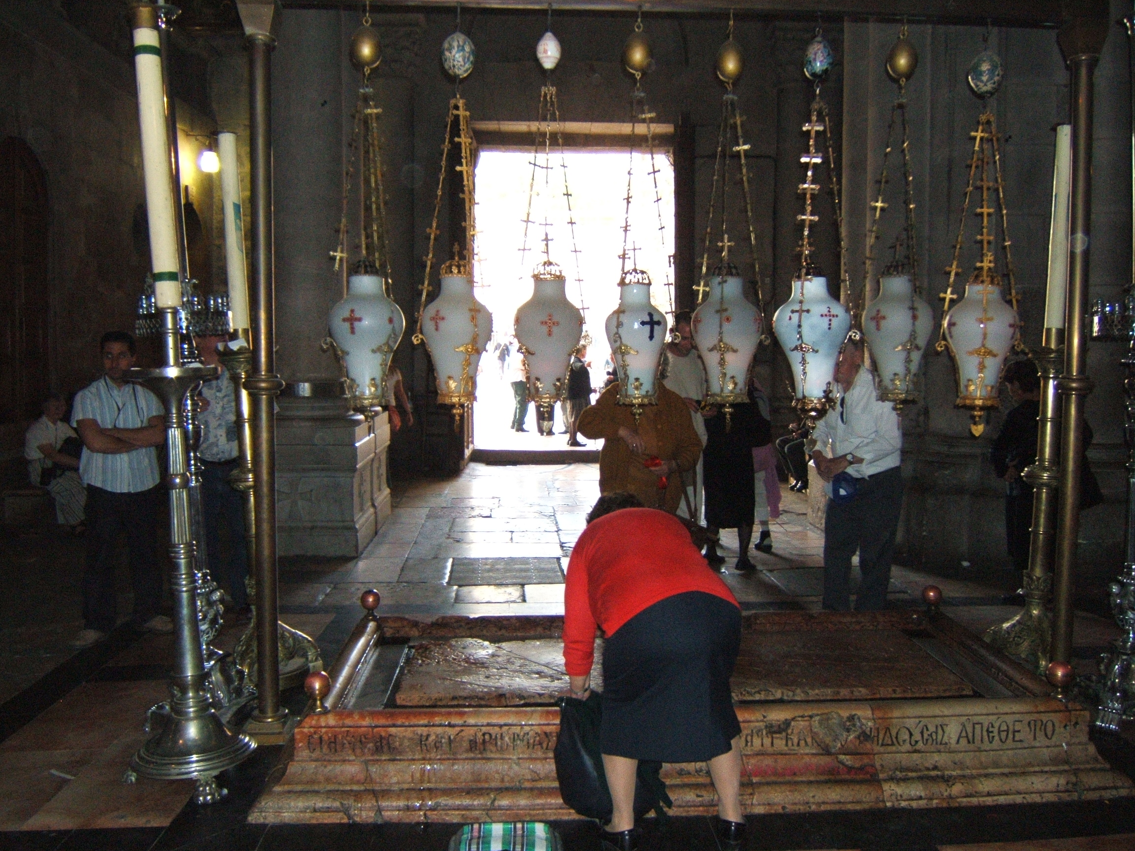 Iglesia del Santo Sepulcro, vista de la entrada y de la piedra donde fue depositado Jesús luego de ser bajado de la cruz. Jerusalén, Israel.